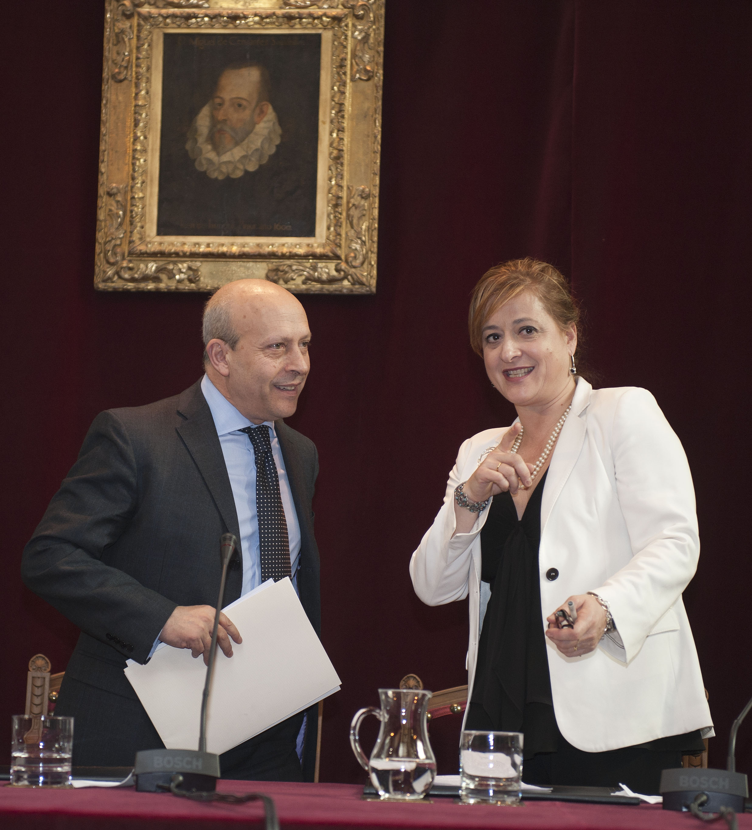 Euskara omendua izan da Madrilen